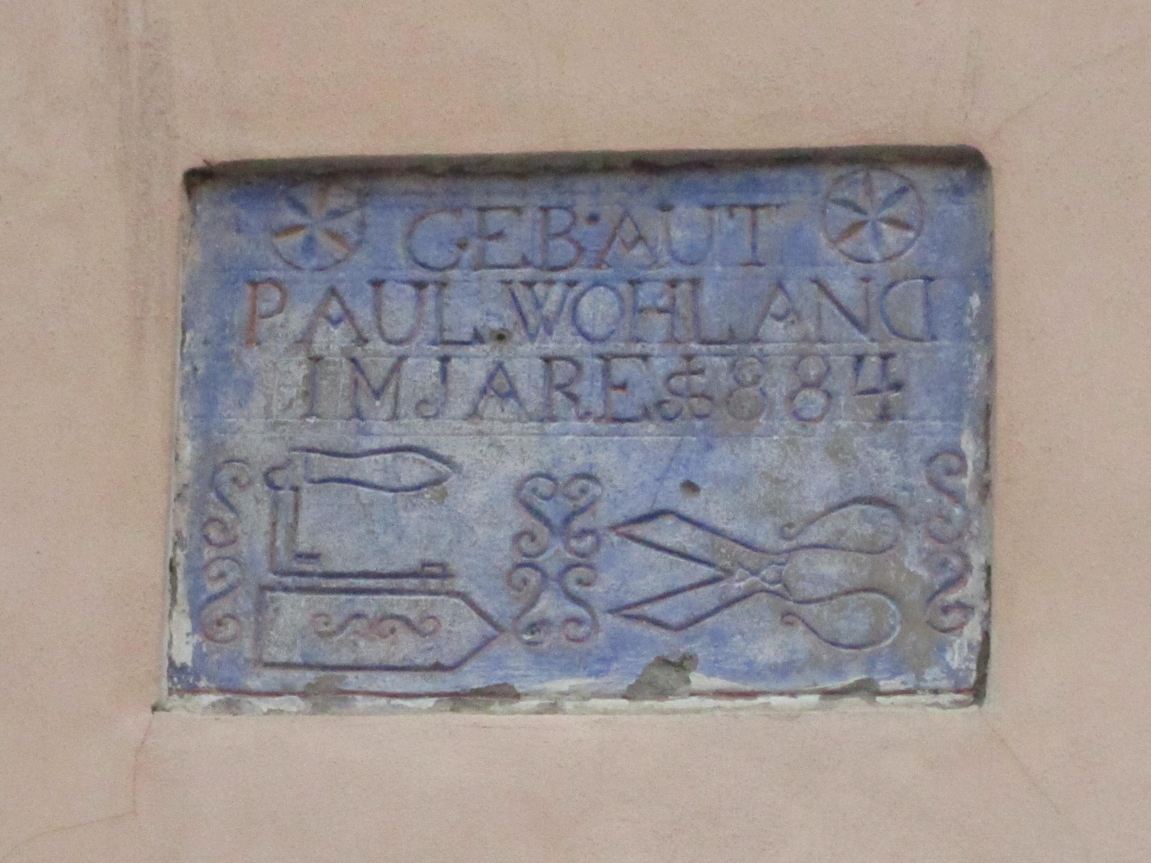 tabuľka s vročením a menom majiteľa domu